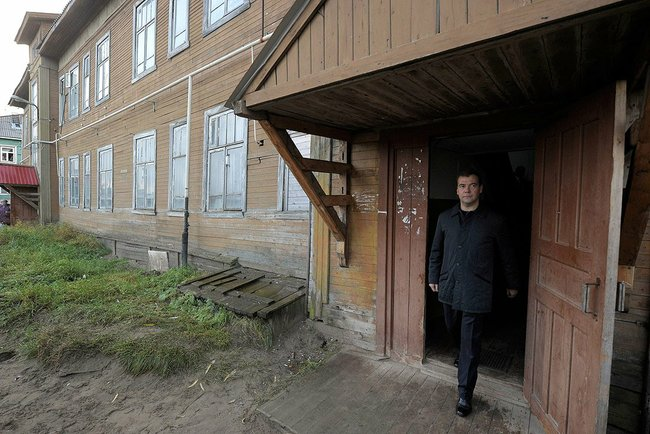 Дмитрий Медведев, совершающий рабочую поездку в Нарьян-Мар, побывал в одном из городских домов, относящихся к категории ветхих.